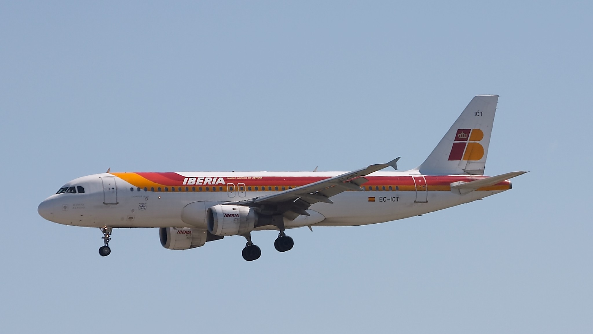 Airbus A320-211 de Iberia a punto de aterrizar en la pista 33. Aeropuerto de Madrid Barajas.